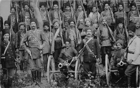 Persian Cossack brigade, Soujbulak.